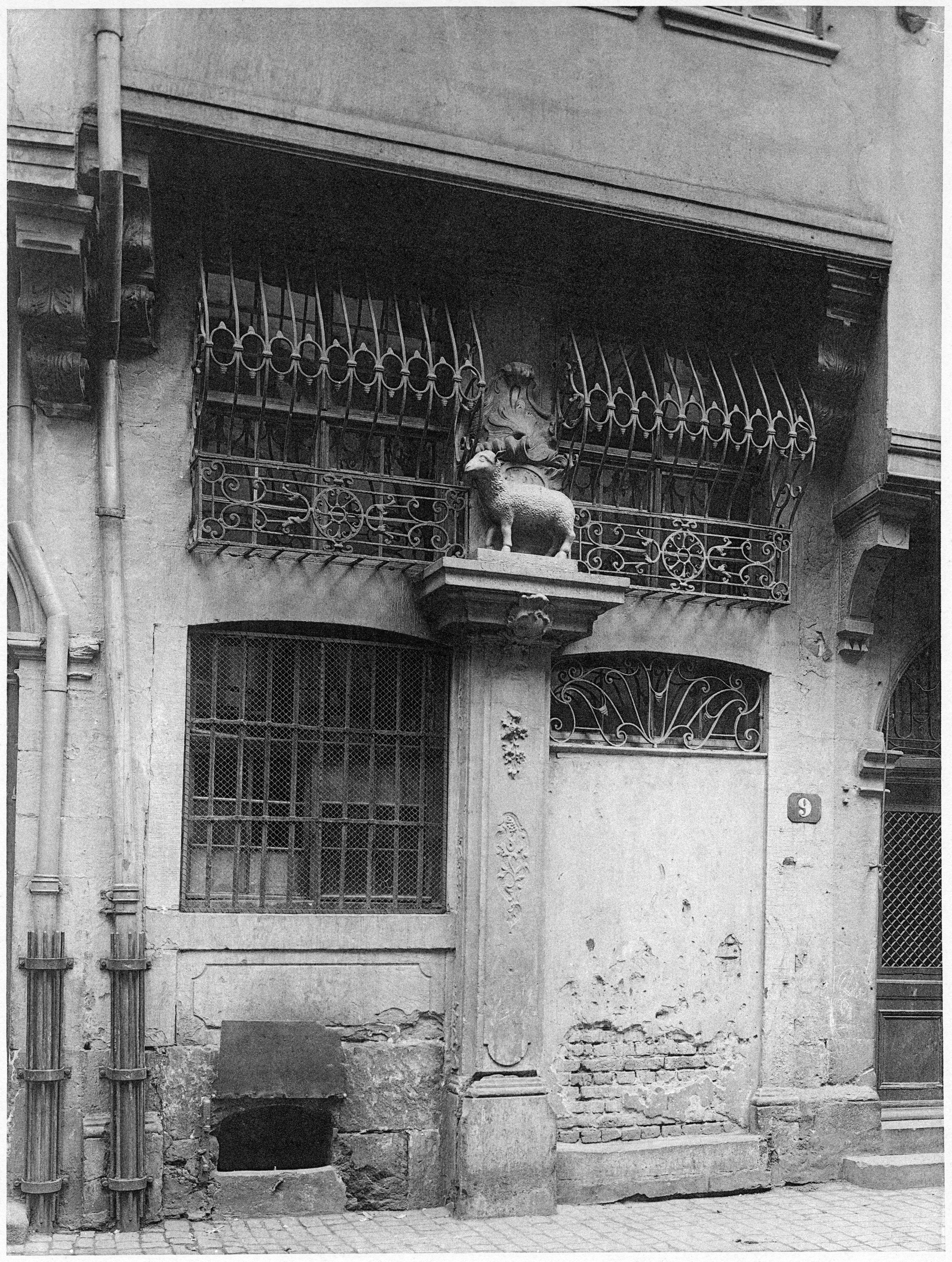 Gehört zu dem Hause „Zum alten Burggrafen“ auf dem Markt. Im Jahre 1472 war hier der Born zum Lämmchen. Später wurde er mit Erde zugeworfen, der Brunnenstock blieb aber stehen und erhielt ein vergoldetes Lämmchen als Krönung.